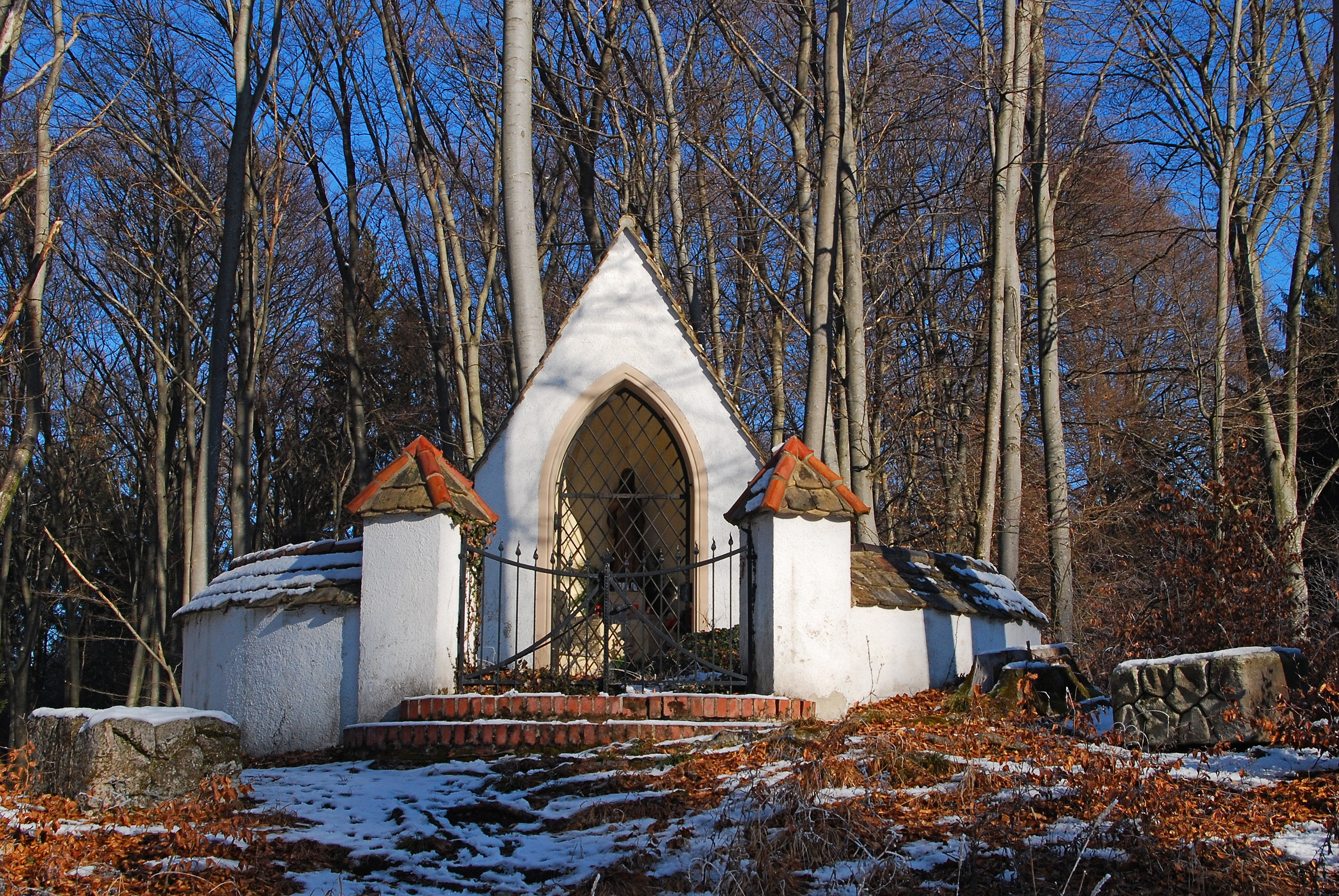 Pähl, OT Hartschimmel, Haushofer-Kapelle. Begräbnisstätte des Geographen Karl Haushofer.